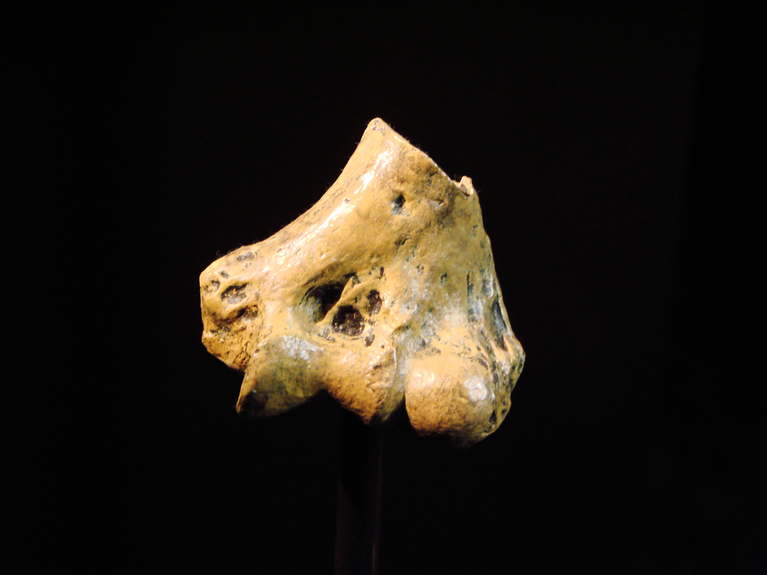 Muséum d'Anthropologie, campus universitaire d'Irchel, Université de Zurich (Suisse) : Australopithecus anamensis, extrémité distale de l'humérus droit (Kanapoi, Kenya), KNM-KP 271.